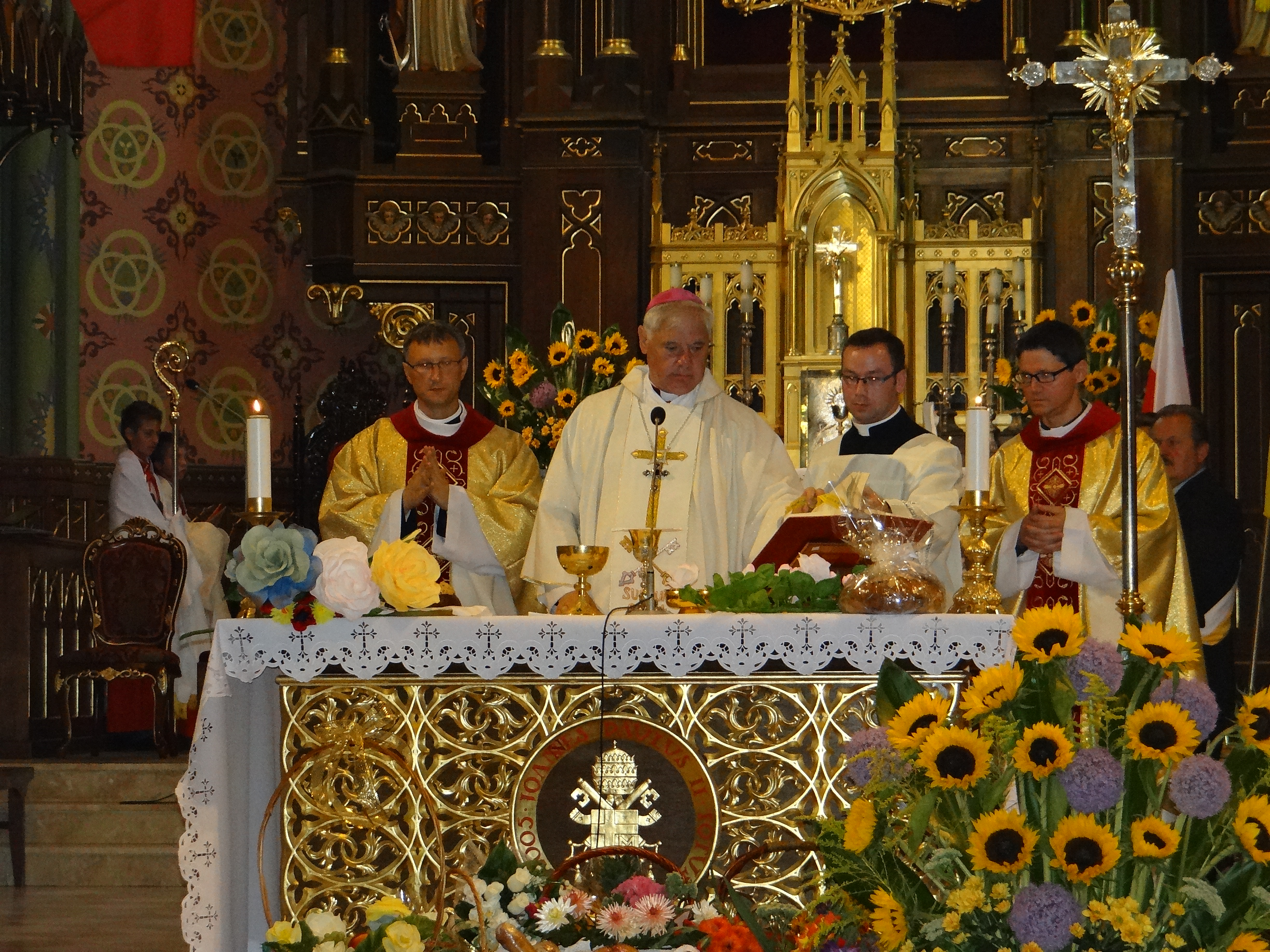 XXXV Miodobranie Kurpiowskie - Msza Święta